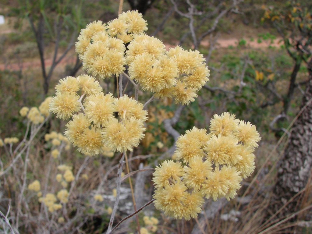 Achyrocline satureioides - ASTERACEAE Parque Estadual da Serra dos Pirineus - Pirenópolis - Goiás - Brasil.